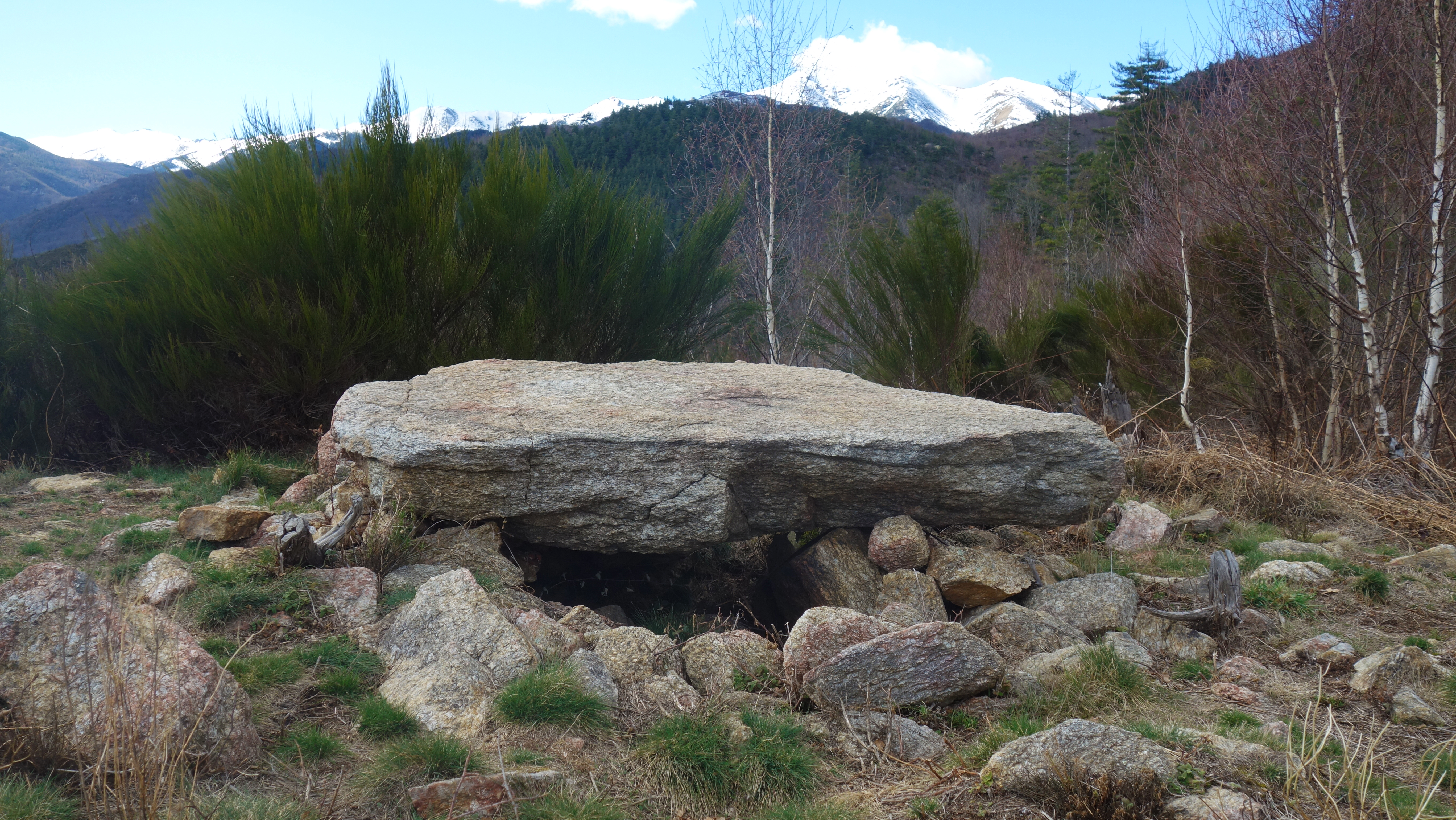 Découvert en 2011, en montant, accès par un chemin (balisé) qui part du mas de Les Garcies vers le col et l'oratoire du Miracle.